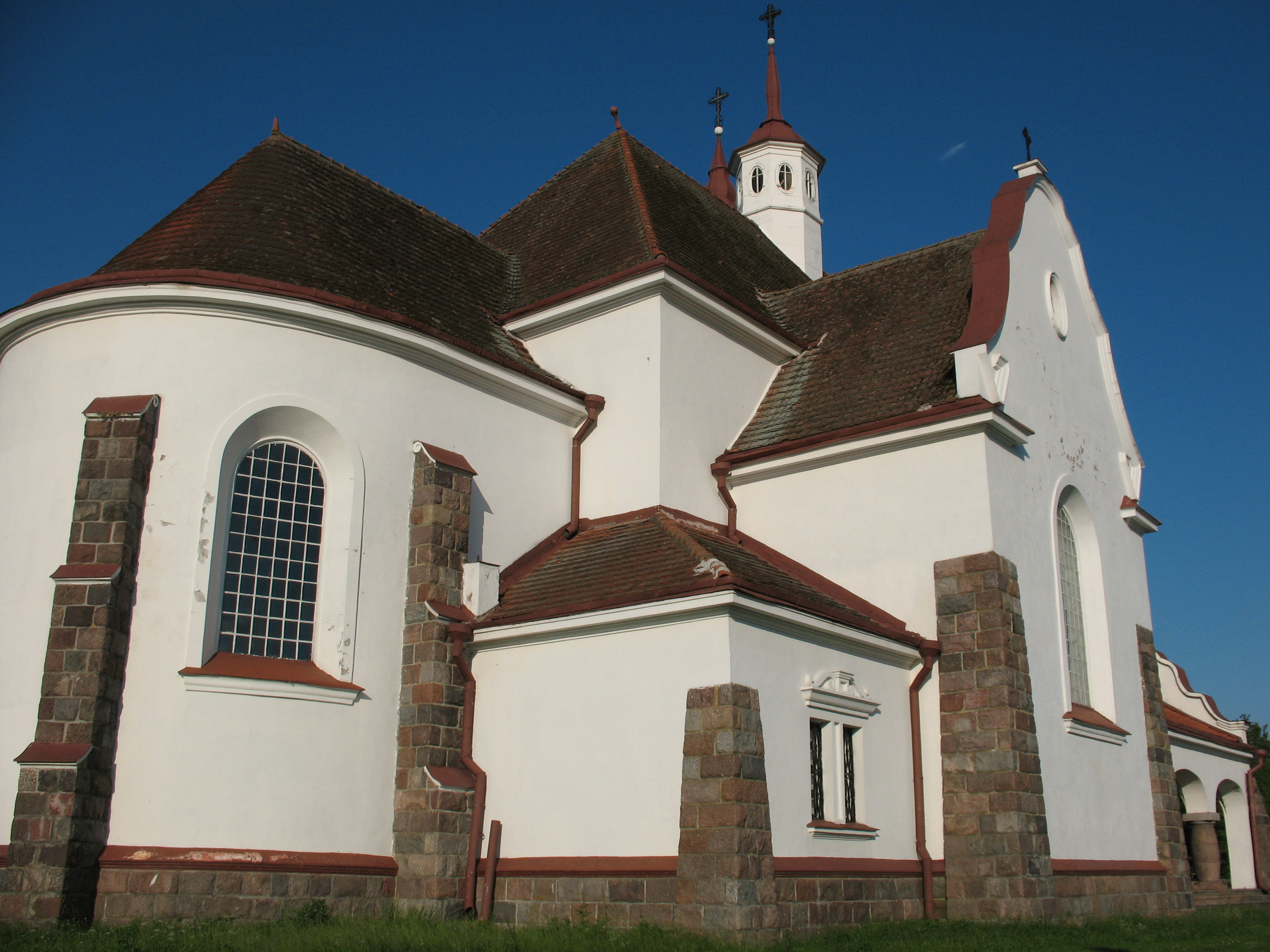 Беларуская (тарашкевіца): Касьцёл Маці Божай Ружанцовай. в. Солы This is a photo of Belarusian heritage monument. Reference number: 412Г000713 ( WLM)